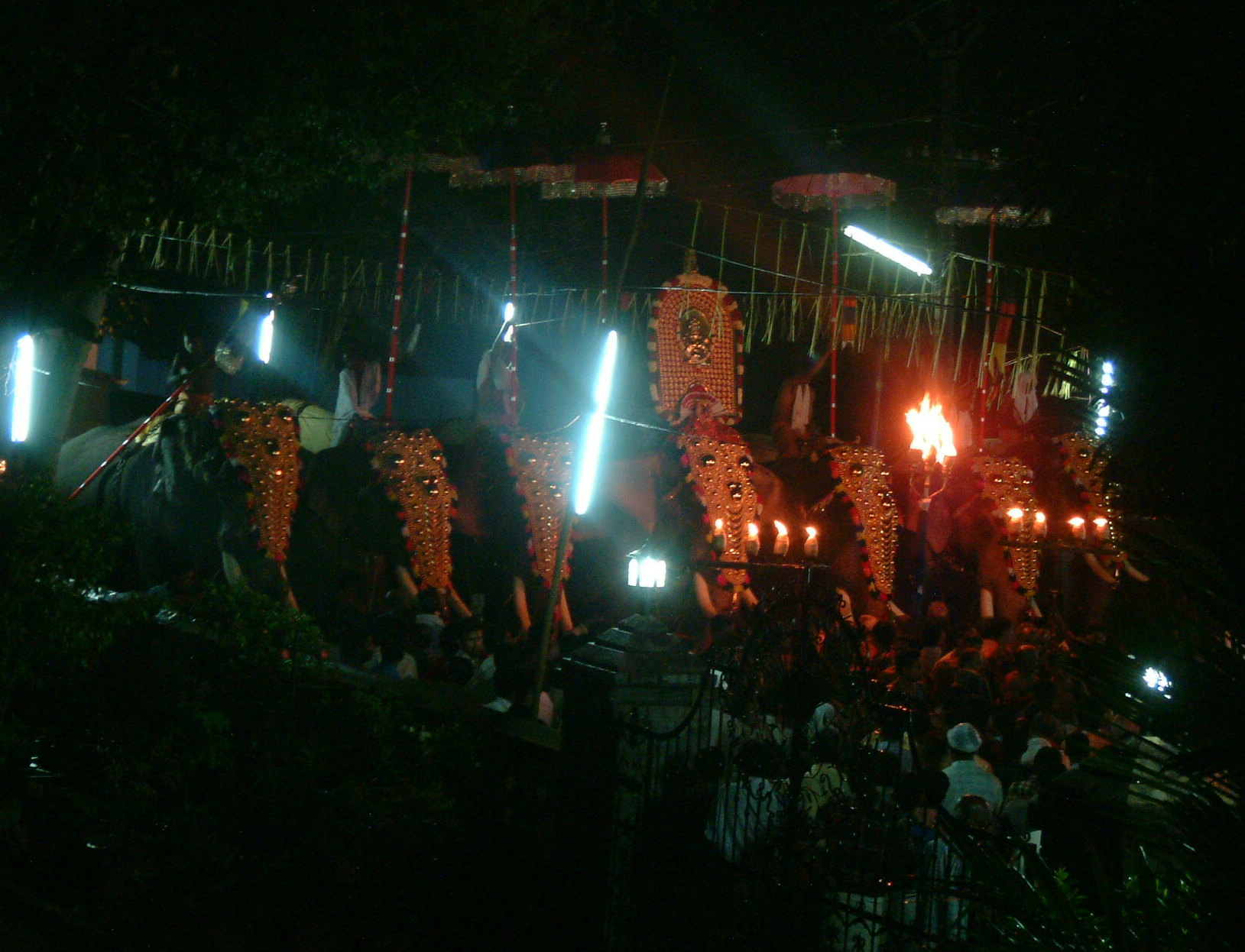 ചള്ളിയാൻ എടുത്തത്